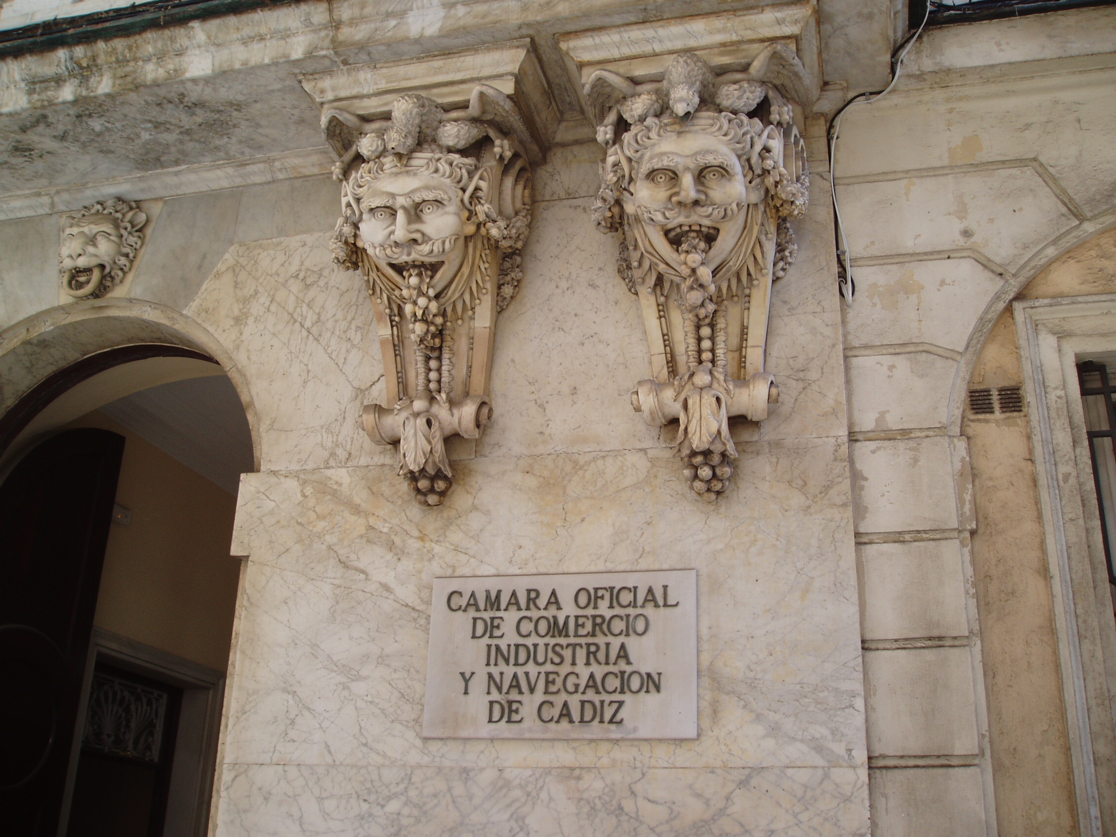 Edificio de Cádiz (detalle).